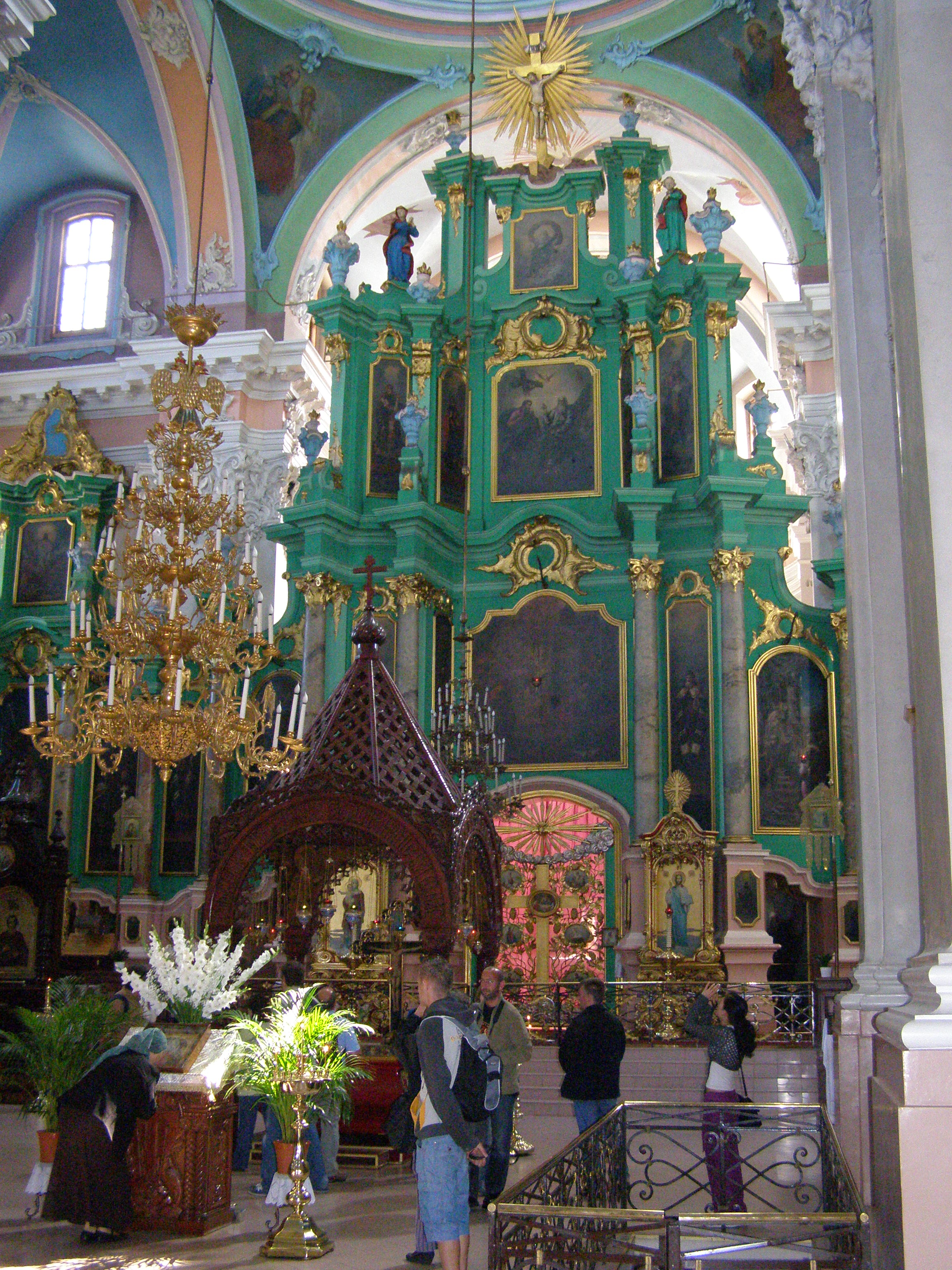 Ikonostas w cerkwi Świętego Ducha w Wilnie